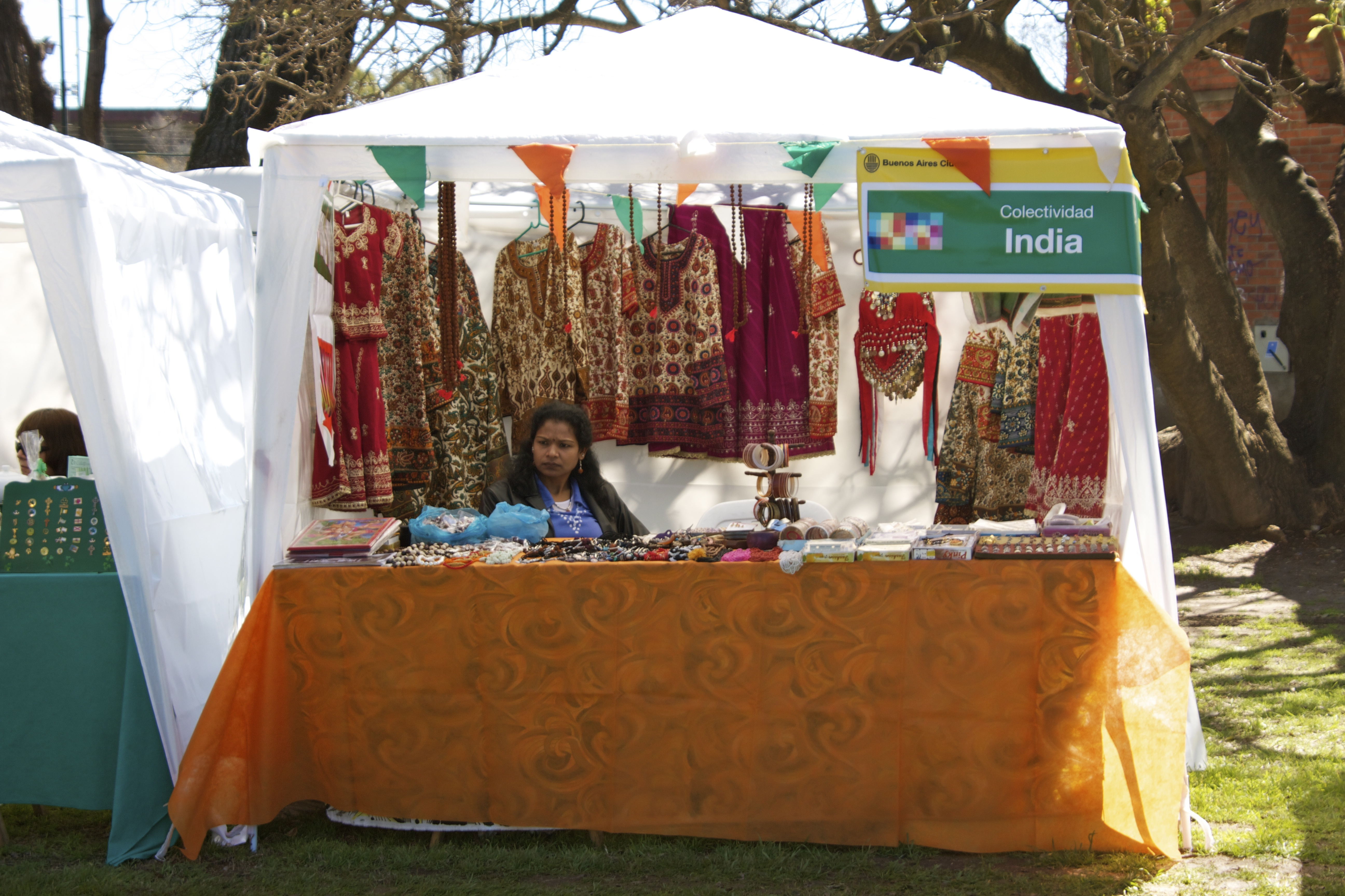 Dia del Inmigrante 2010 16